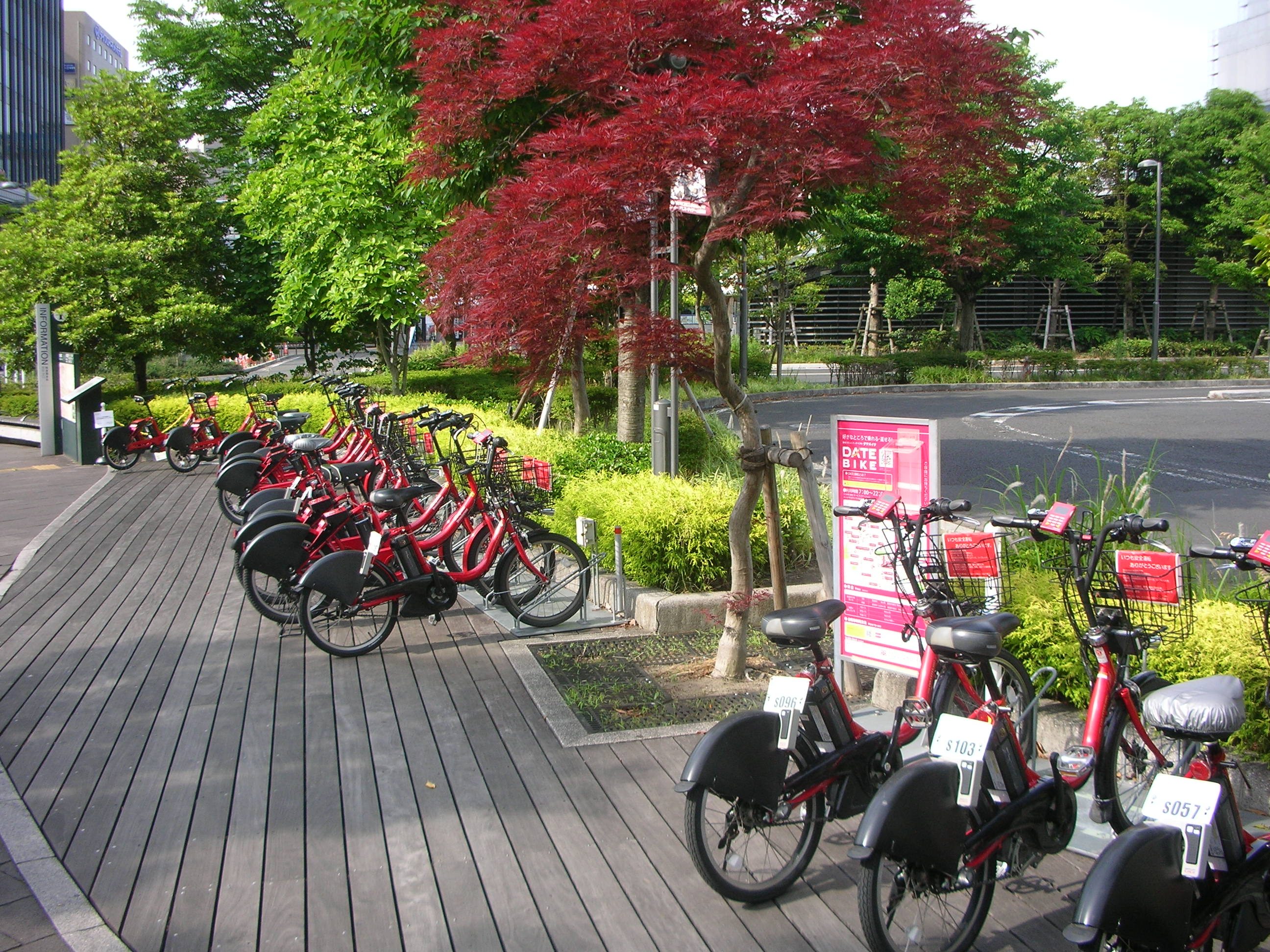 ダテバイク 仙台駅東口ポート